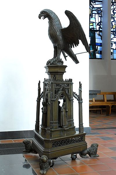 Adlerpult in der Lambertuskirche zu Erkelenz